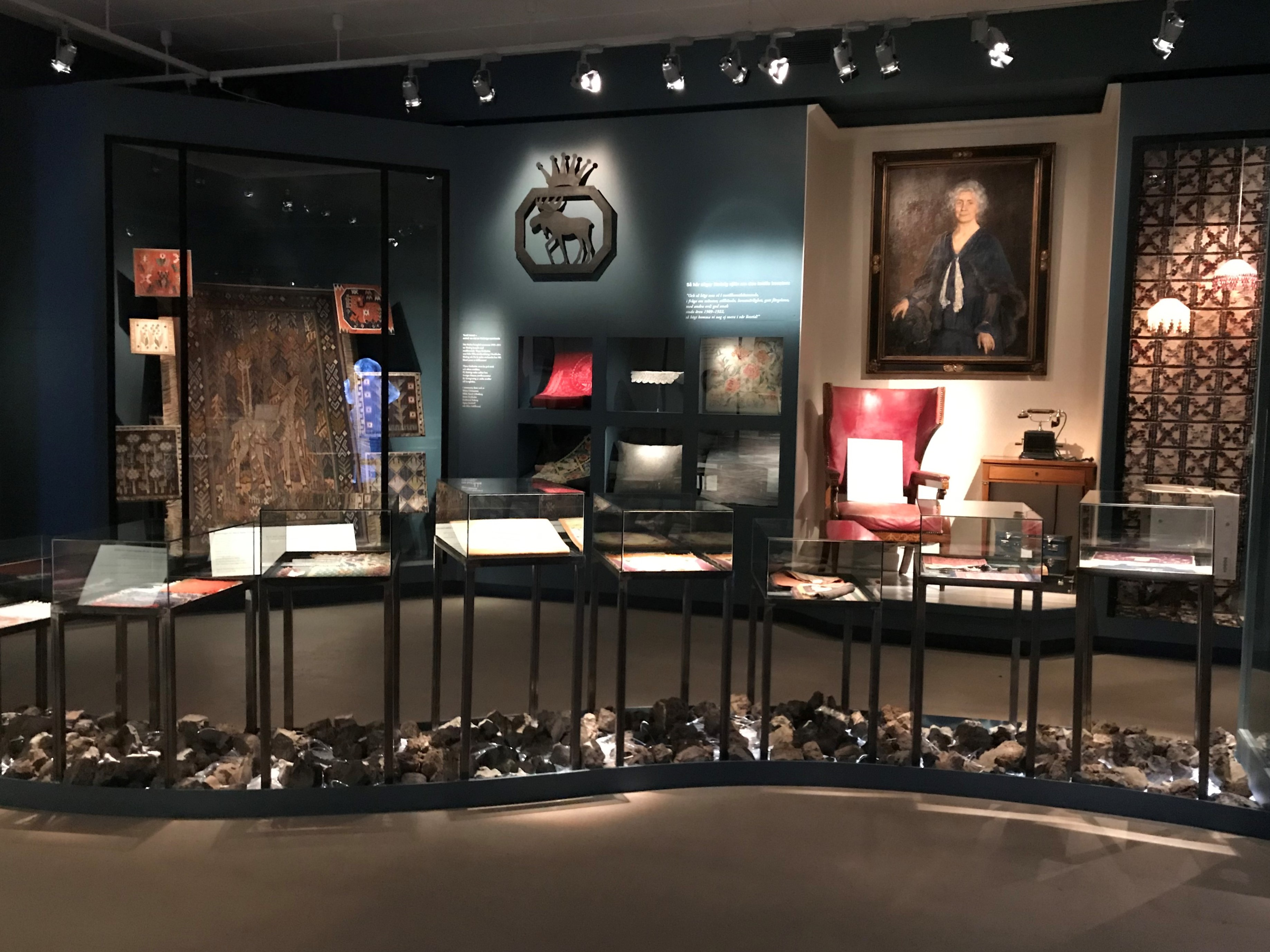 Länsmuseet Gävleborg, Smaken och kapitalet, om Hedvig Ulfsparre och hennes textilsamling